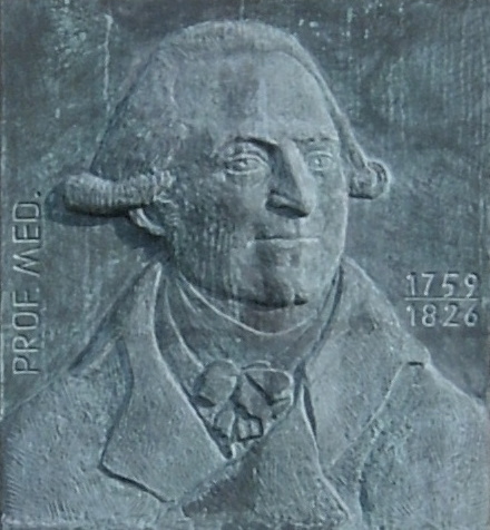 Schild am Wohnhaus in Frankfurt (Oder) im Studentendorf Mühlenweg. Dargestellt ist der Rektor der Viadrina Carl August Wilhelm Berends (19. April 1759 Anklam, gest. 01. Dezember 1826 Berlin)